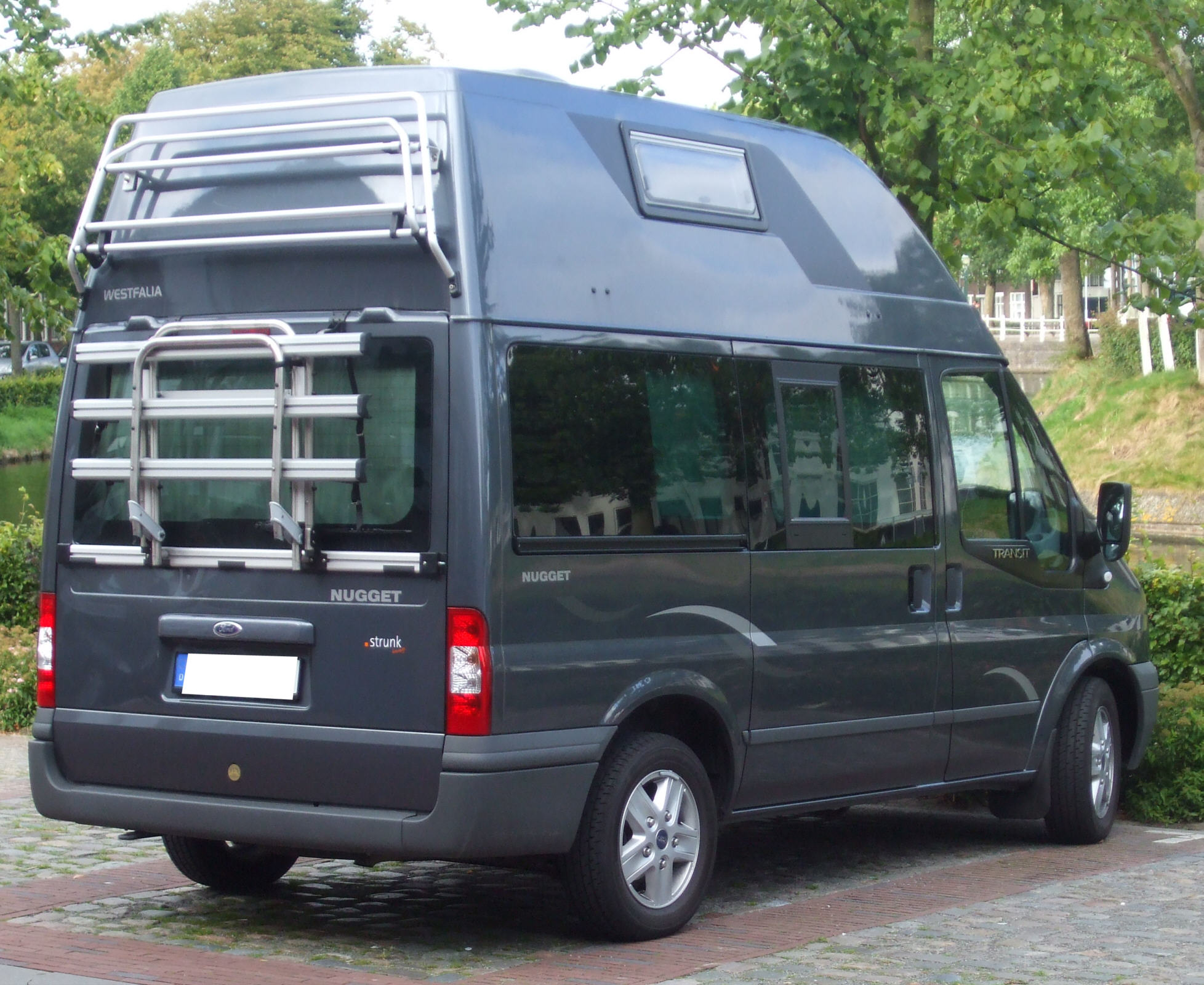 neuer Ford Transit als Westfalia-Wohnmobil „Nugget“